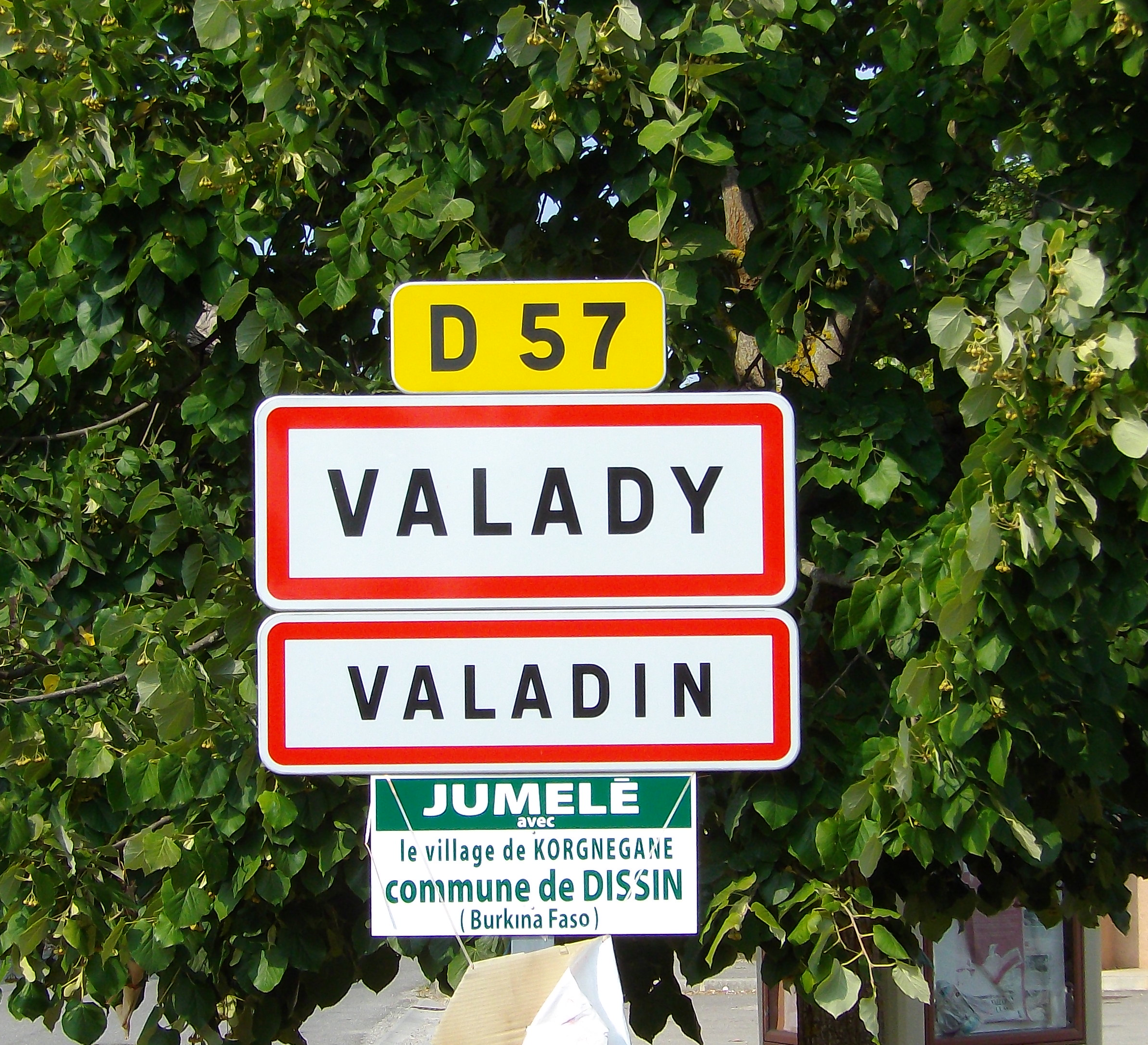 Panneau bilingue français-occitan à l'entrée de Valady (Aveyron, France)